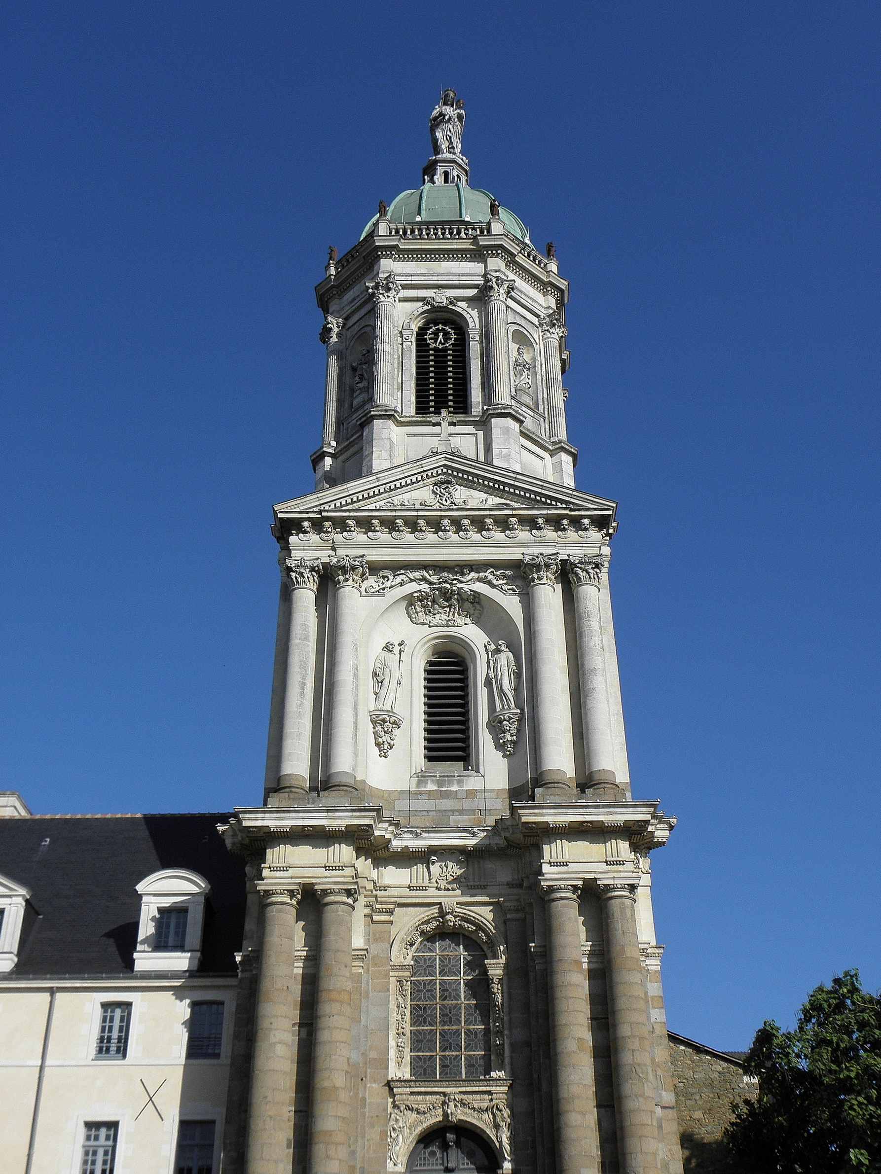 Tour-clocher de l'église Notre-Dame en Saint-Melaine de Rennes (35).